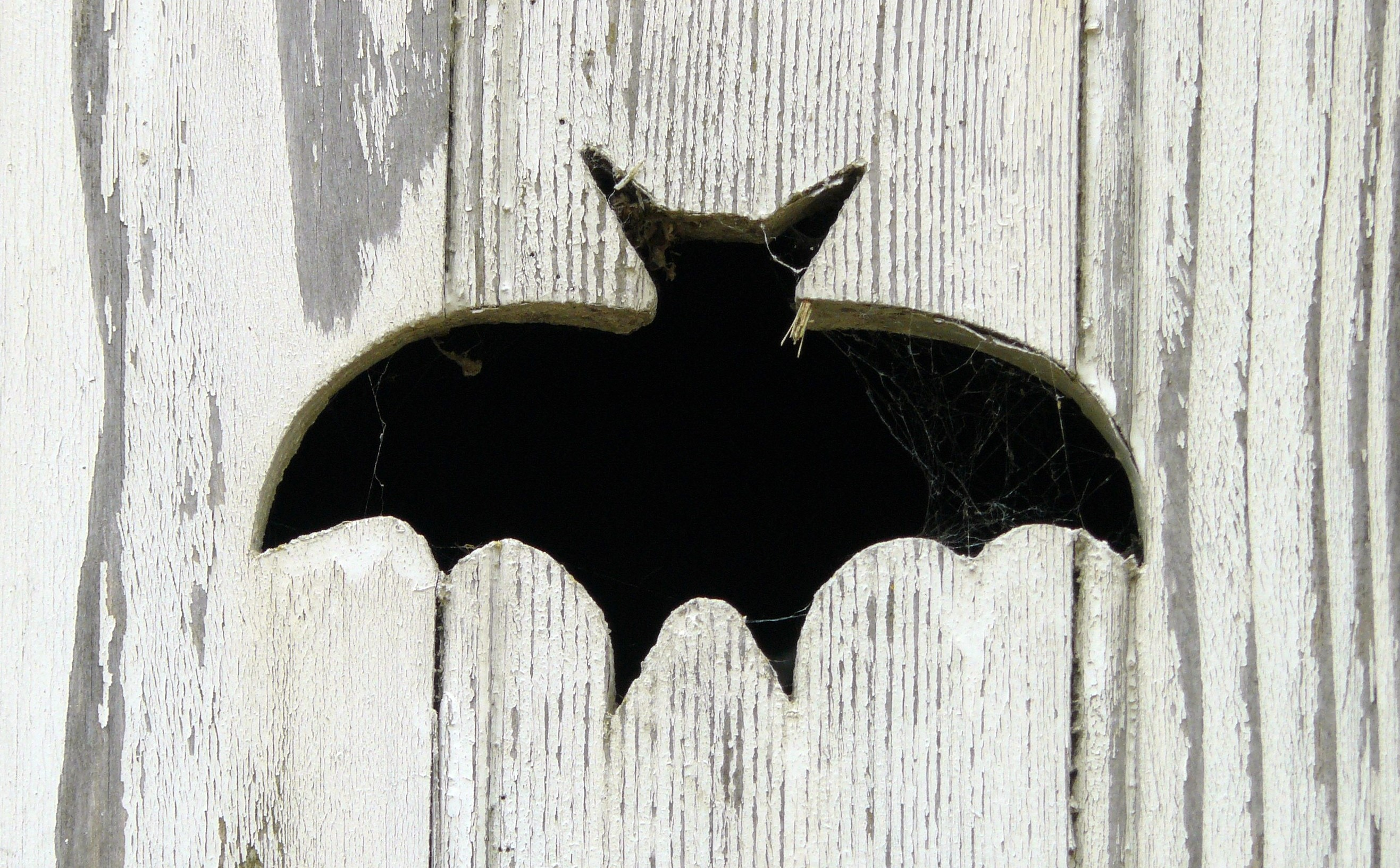 Silhouette d'une chauve-souris, symbole de Montchauvet (Yvelines, France) découpée dans un volet d'une maison du village.